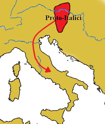 In rosso la possibile zona d'origine degli Italici corrispondente al gruppo di Velatice-Baierdorf. Fonte: Kristian Kristiansen-Europe Before History pg. 388